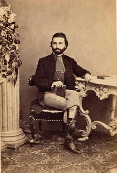 Pauli Richárd (1835-1901) kb. 30 éves korában